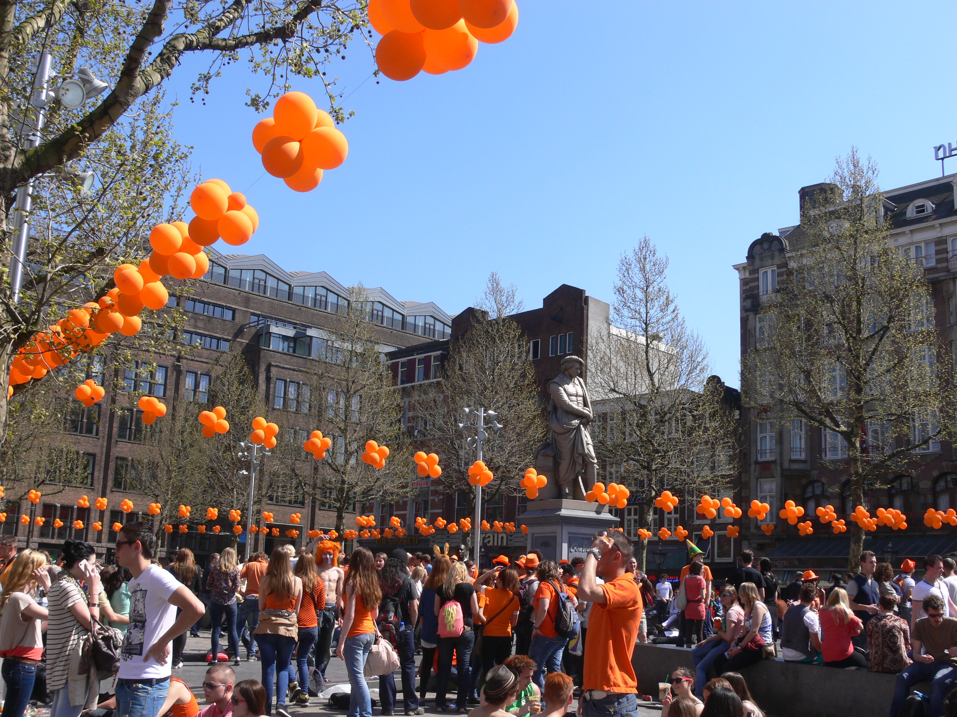 Amsterdam - Koninginnedag 2012 - Rembrandtplein